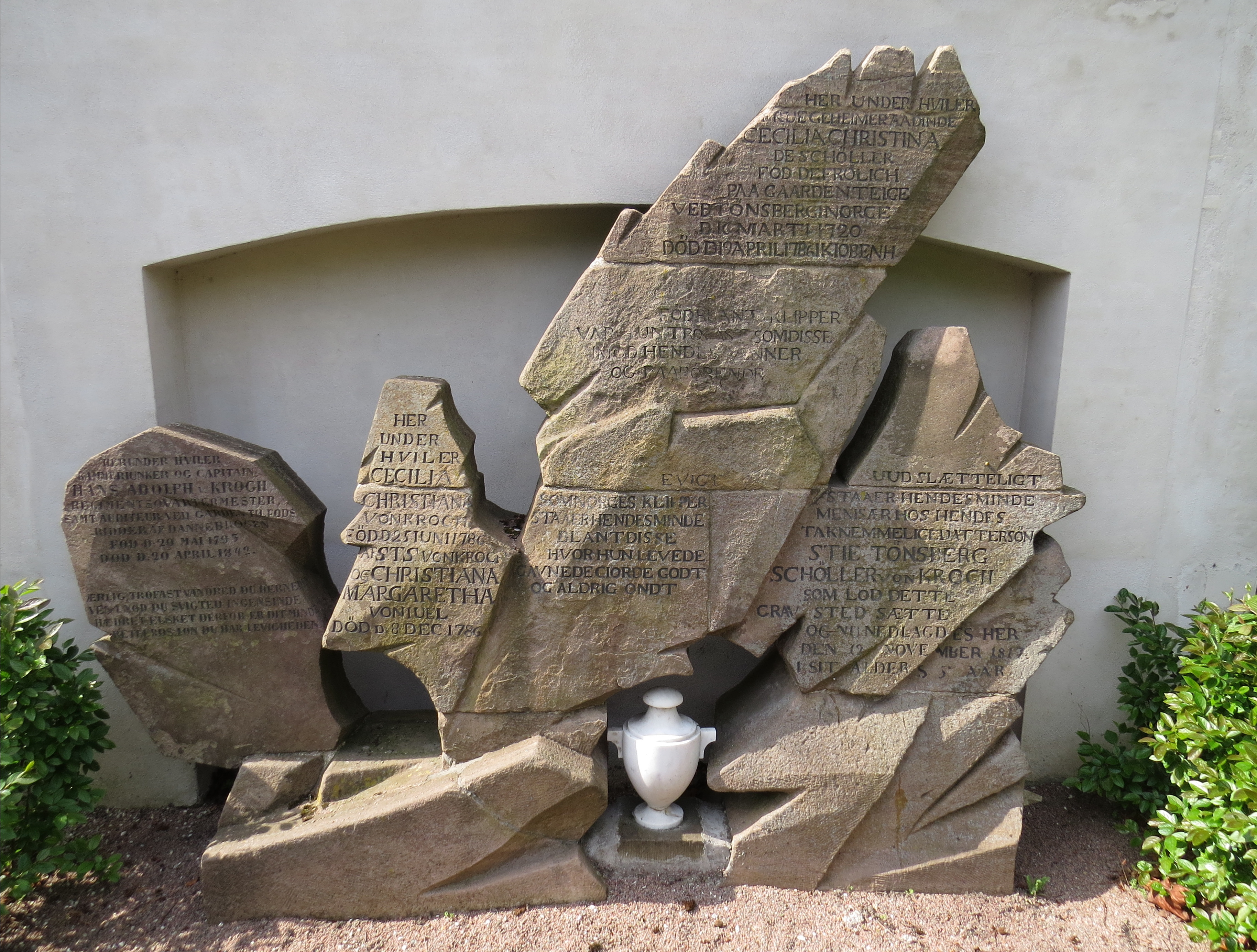 Her under hviler Frue Geheimeraadinde, Cecilia Christina de Schöller, föd de Froelich [...], gravminde på Assistens Kirkegård, København